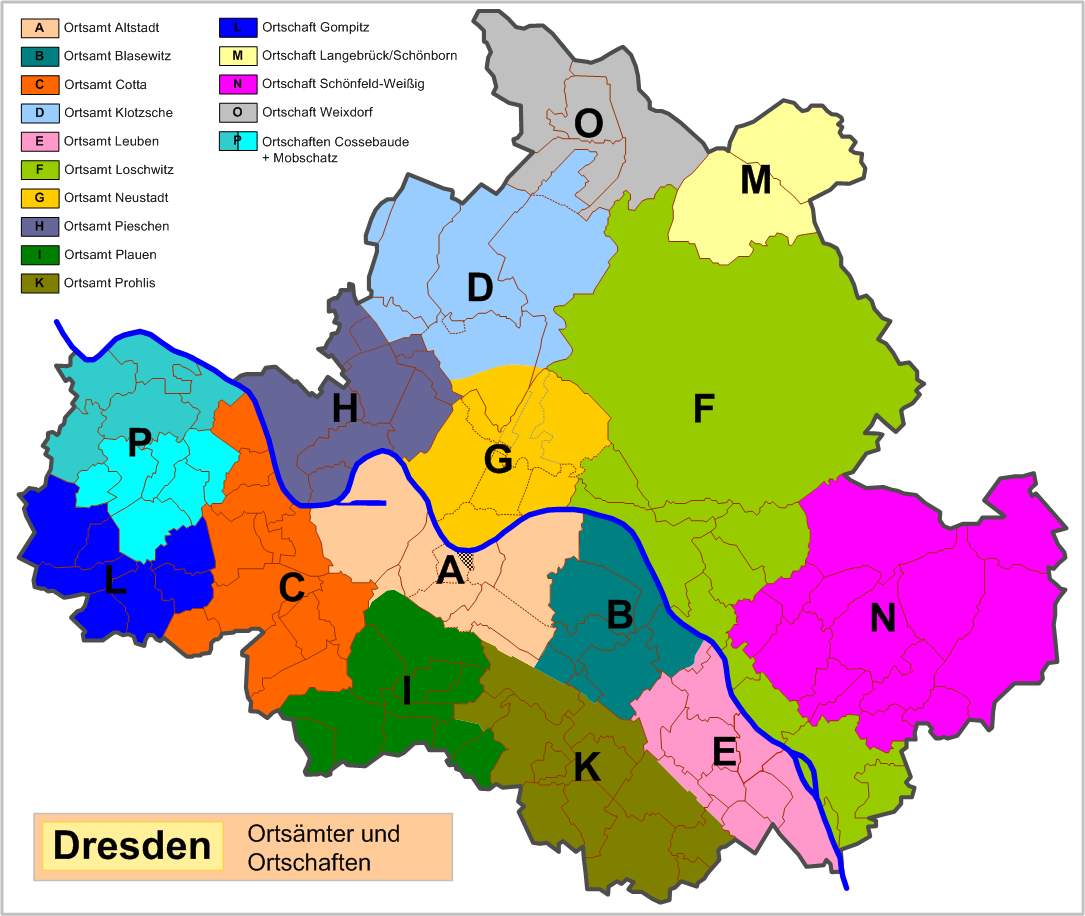 Dresden Ortsaemter und Ortschaften